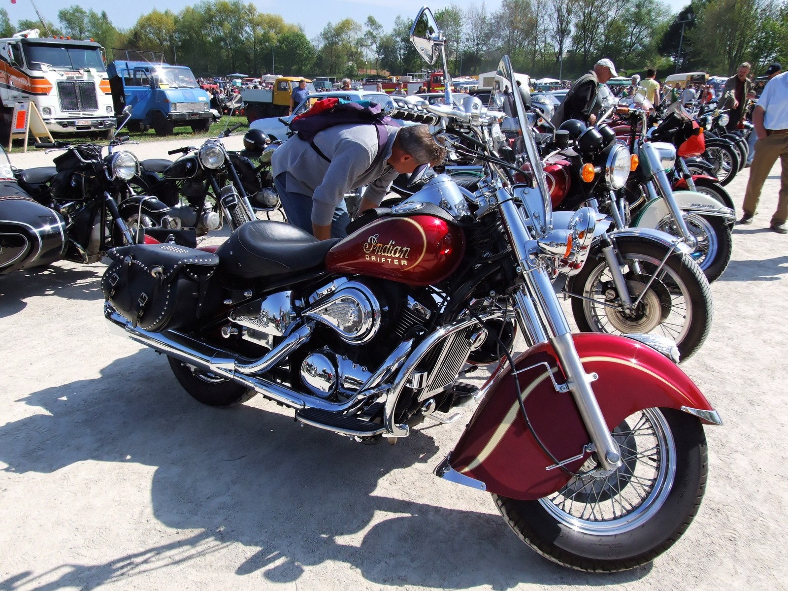 Quelle: selbst fotografiert, 04/2007 Fotograf: Späth Chr.